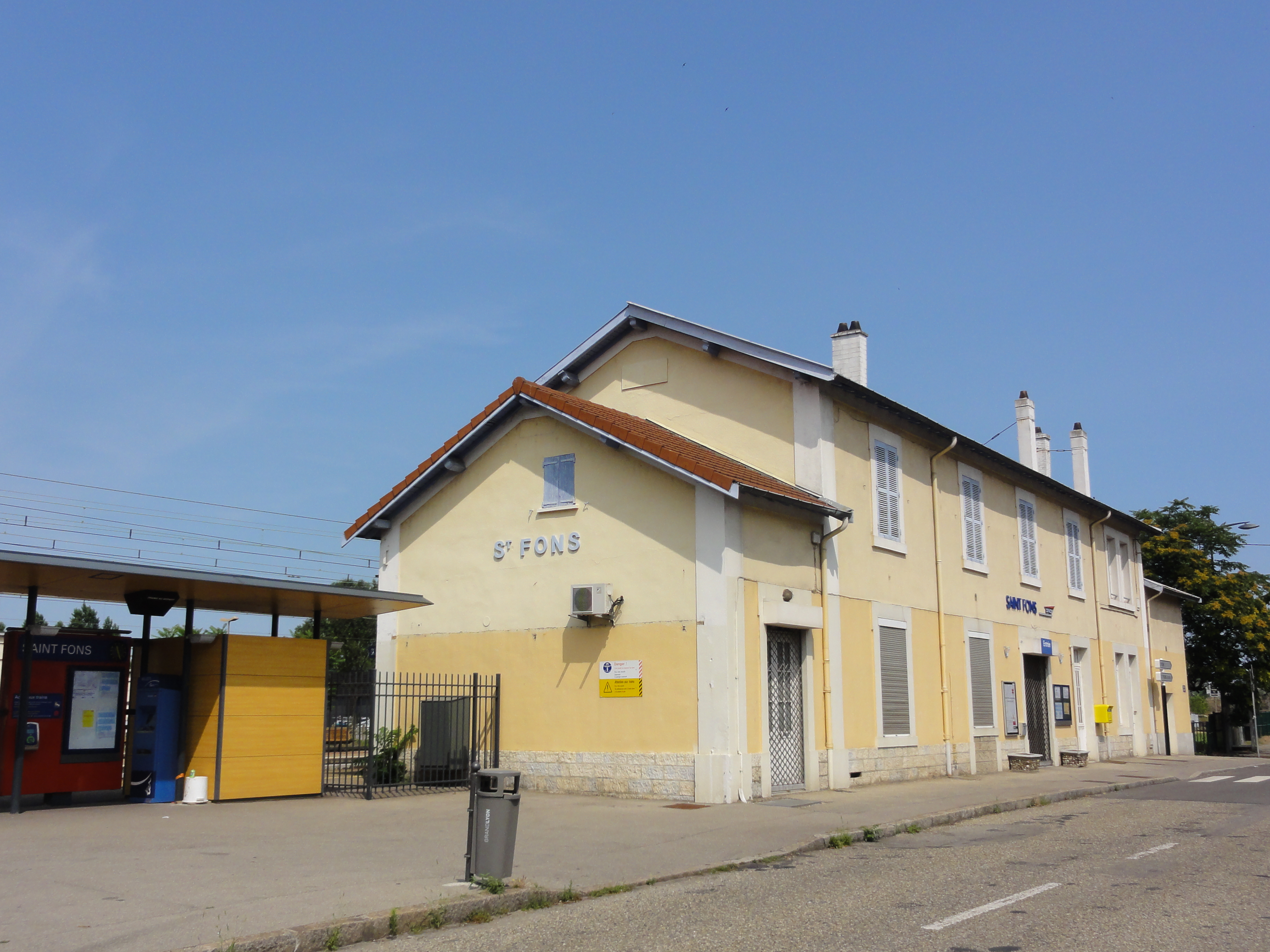 La gare SNCF